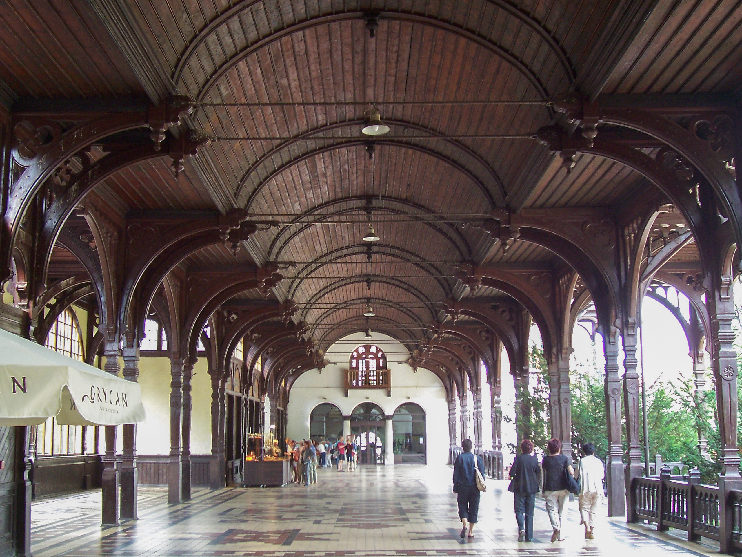 Szczawno-Zdrój - zespół zabudowań zdrojowych, 1822-1894: hala spacerowa (zabytek nr 671/WŁ z 22.02.1977)